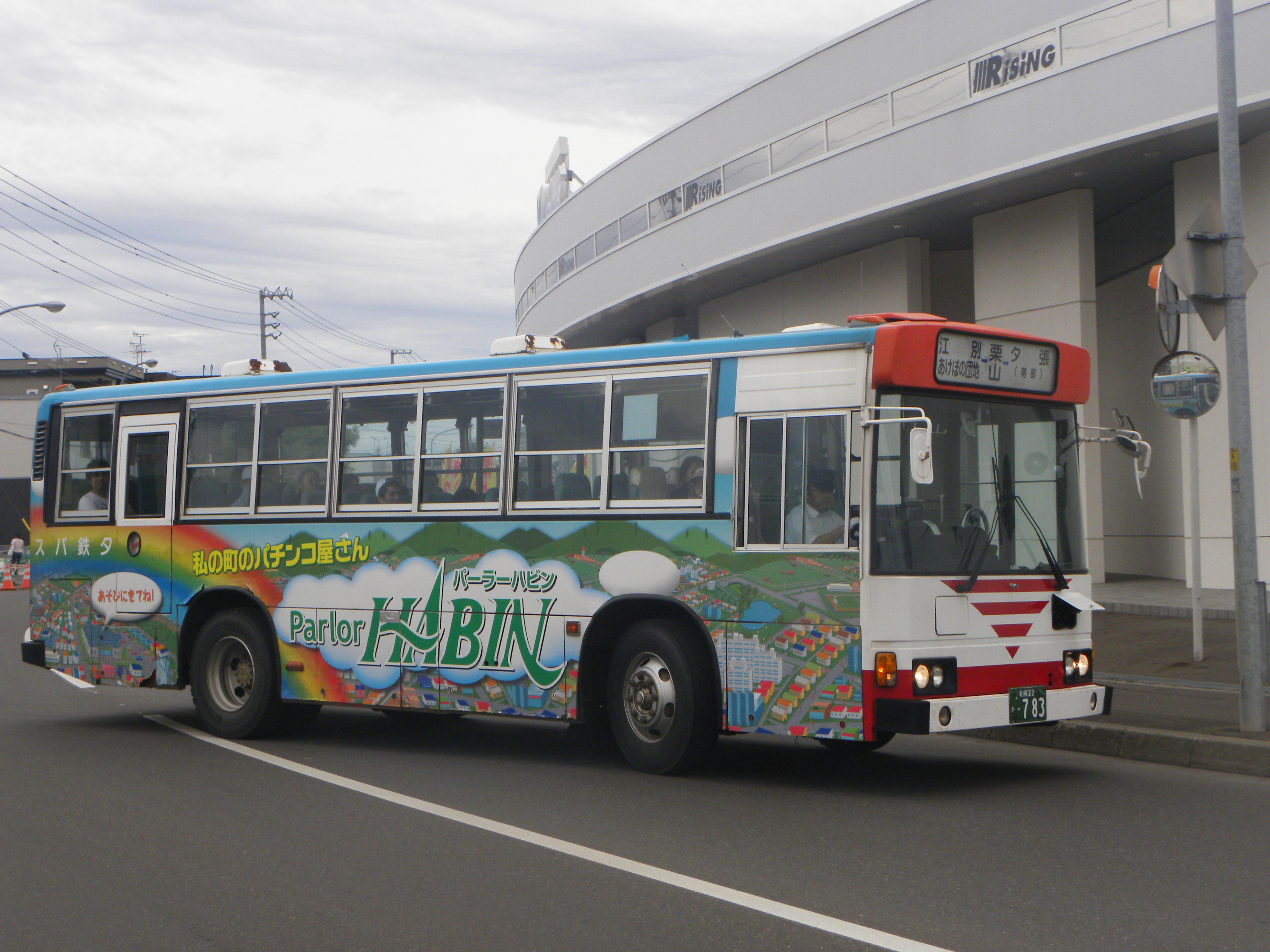 Yūbari Railway Bus 夕鉄バス旧塗装